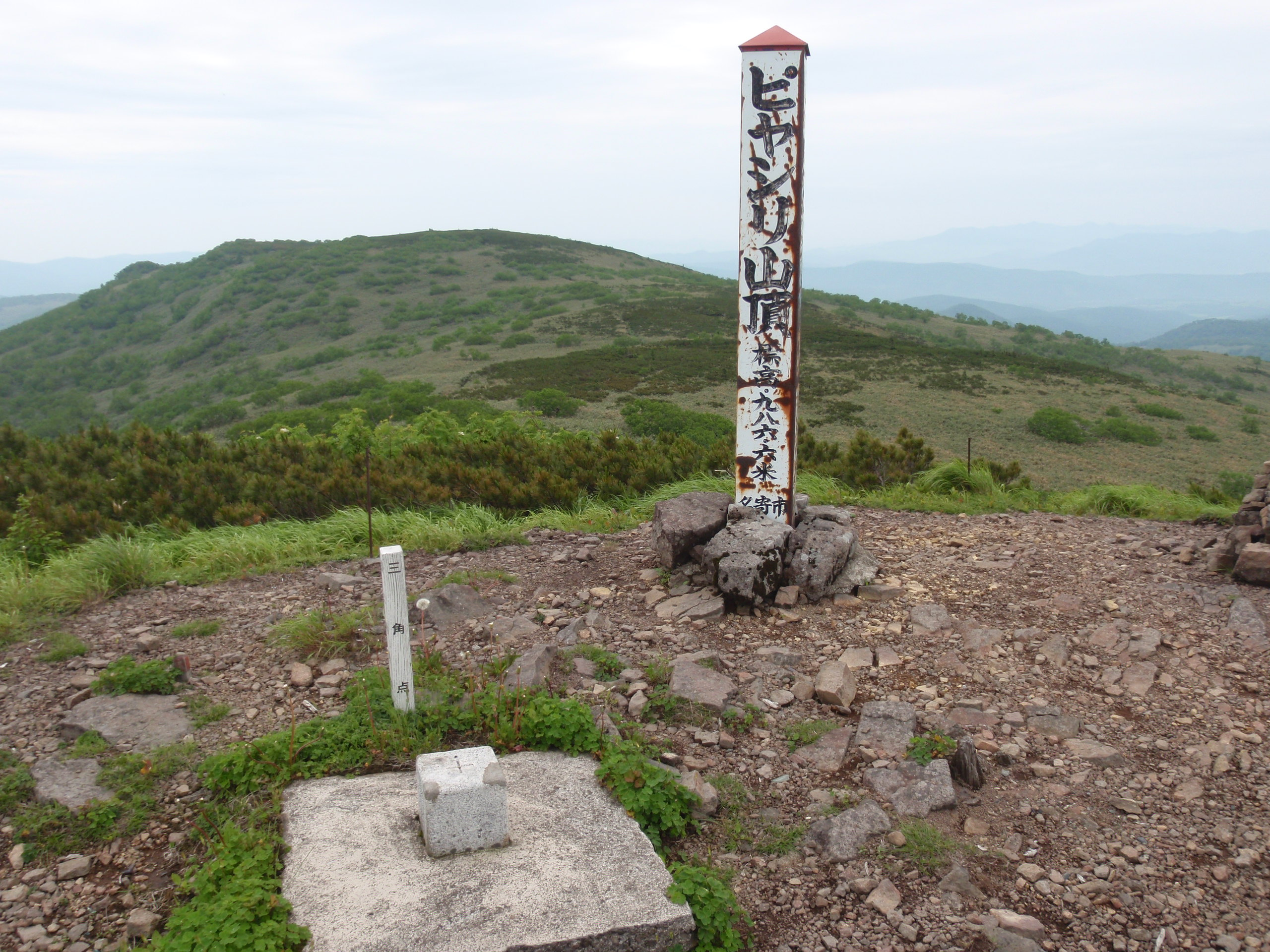 ピヤシリ山山頂